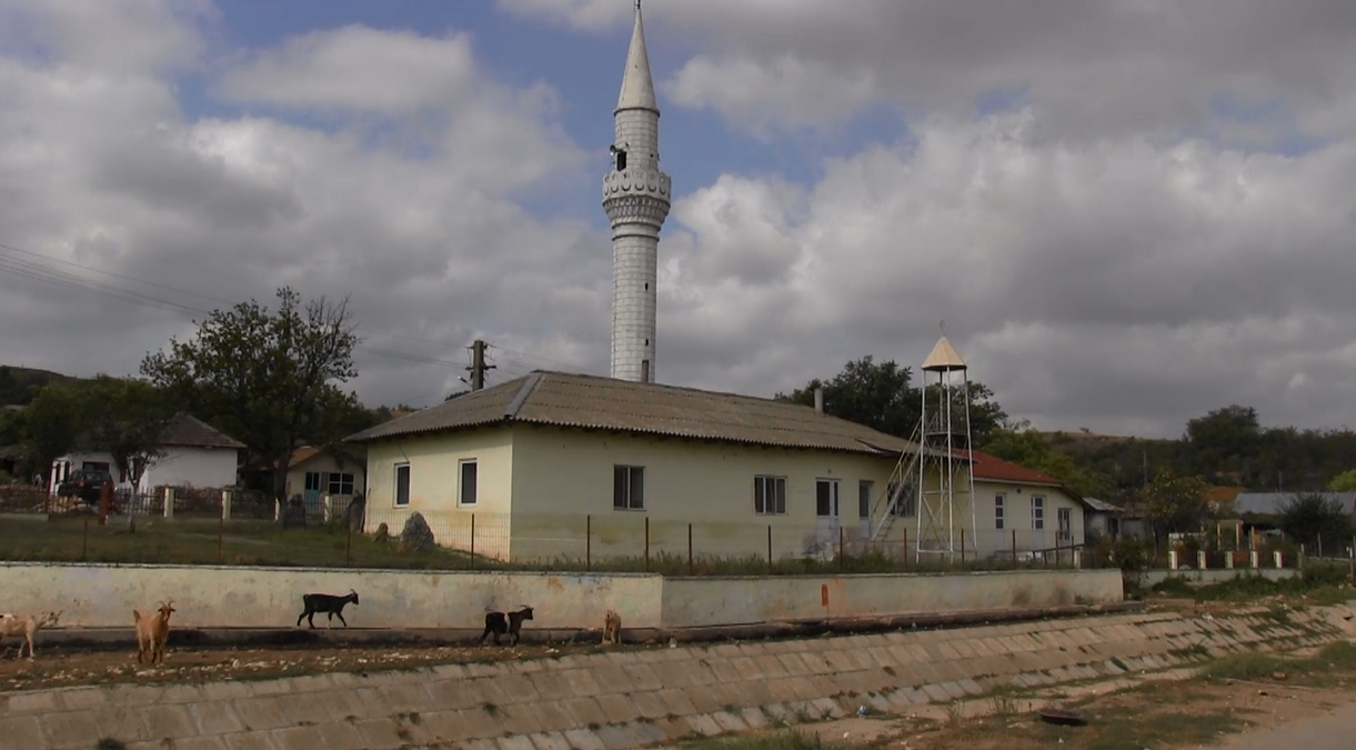 Geamia Fântâna Mare